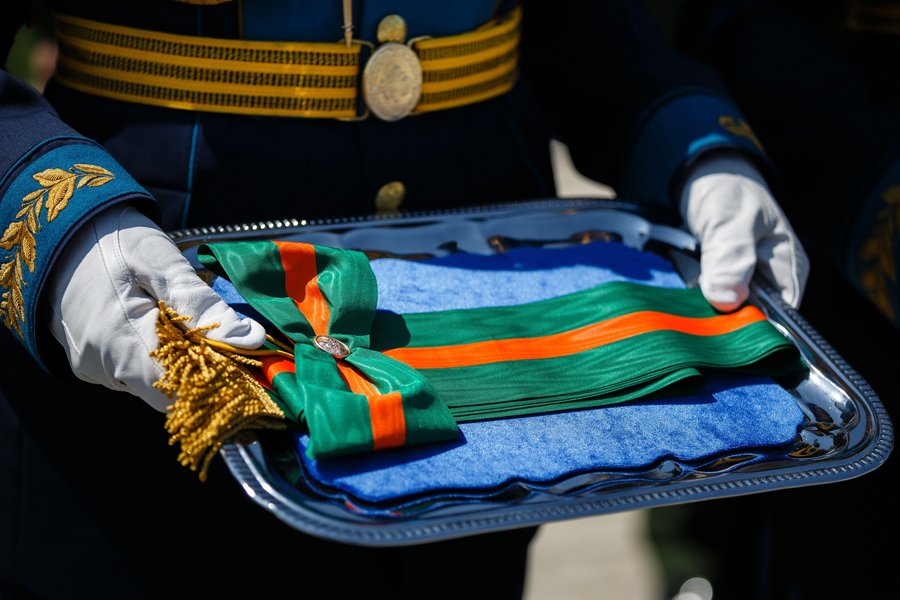 Вручение ордена Суворова 7-й гвардейской десантно-штурмовой (горной) дивизии